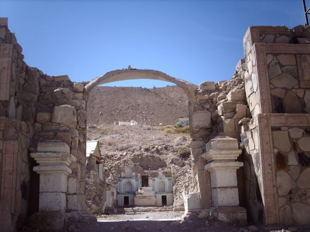 Así está la iglesia de Sibaya luego del terremoto del 2005, era hermosa. Aunque ahora este así, sigue manteniendo su belleza